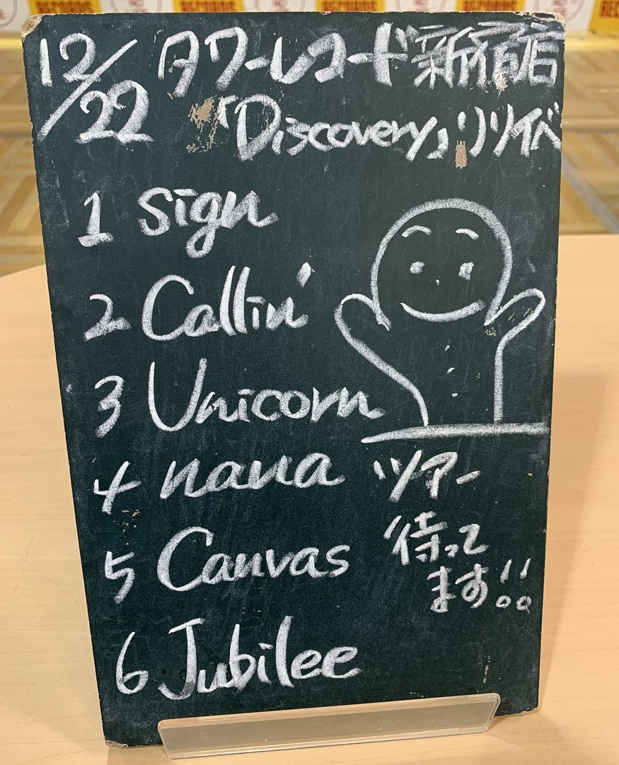 amiinAセトリボード(20181222(1))